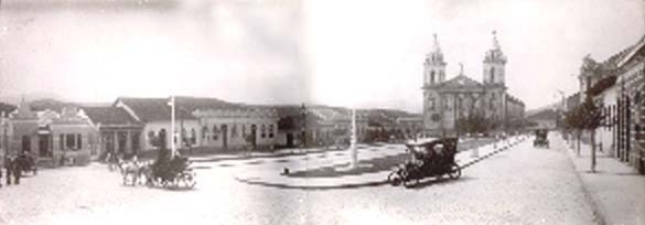 Igreja da Matriz, Amparo, São Pailo, Brazil